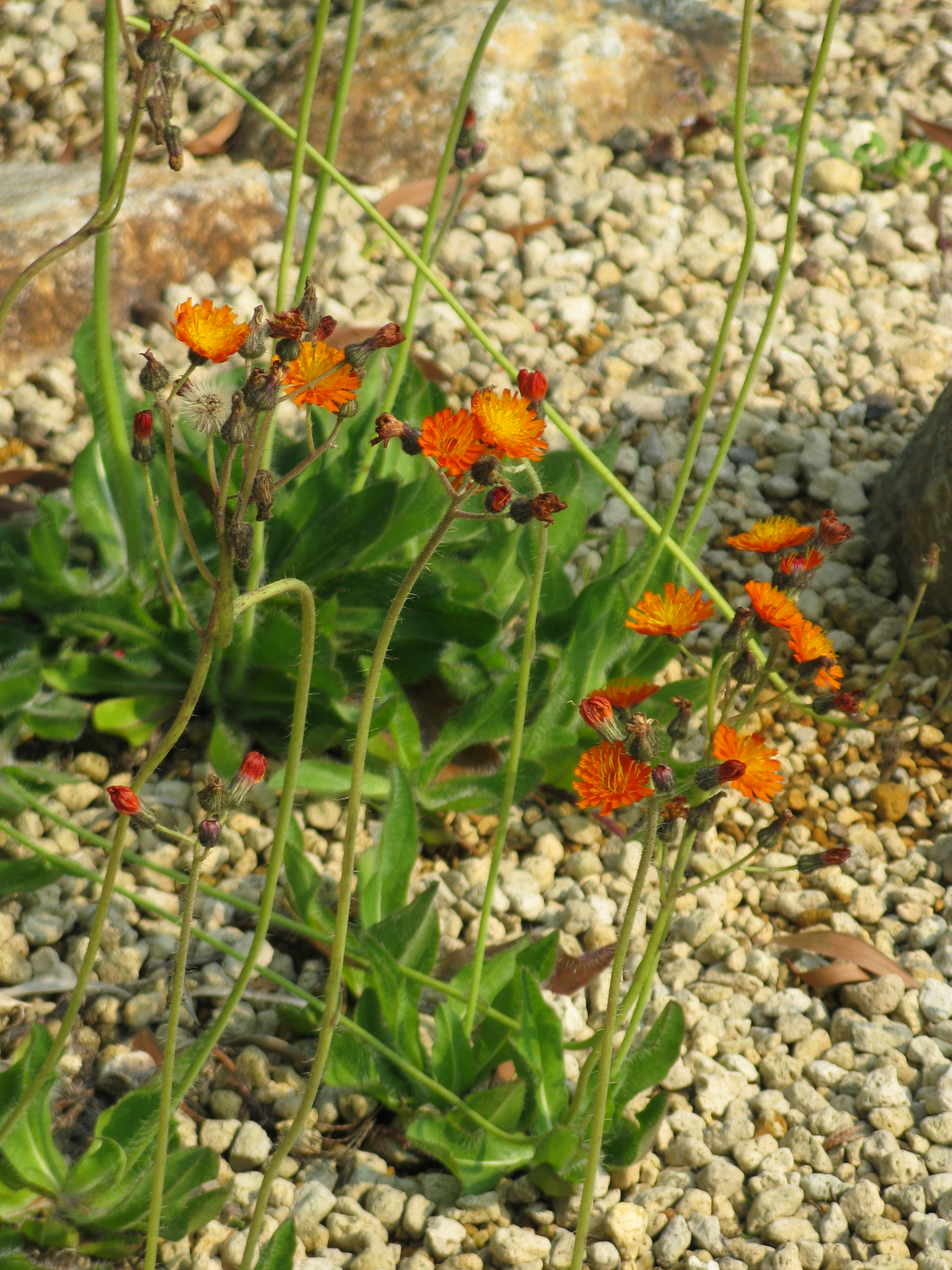 Hieracium aurantiacum